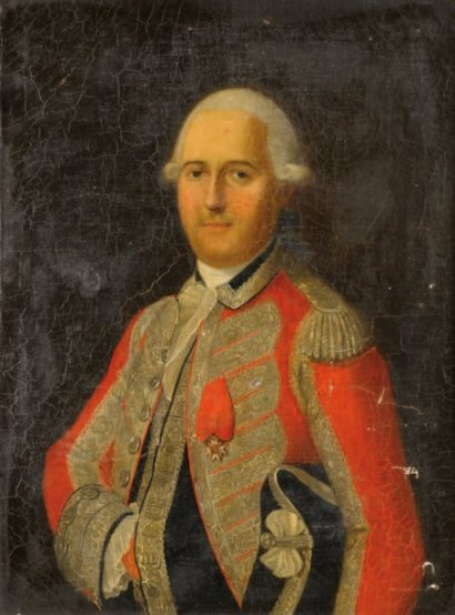 Le personnage représenté est un officier des gardes du corps de Monsieur, Frère du Roi (Le comte de Provence). Il est chevalier de Saint Louis dont il porte la décoration sur la poitrine.